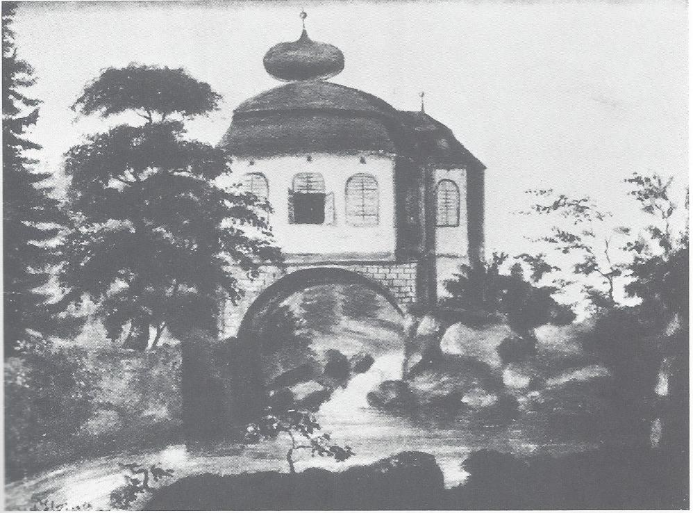 Hans Thoma zugeschriebene aquarellierte Zeichnung nach einer unbekannten Vorlage um 1800: Tusculum über der Alb, um 1850, Kolleg St. Blasien.